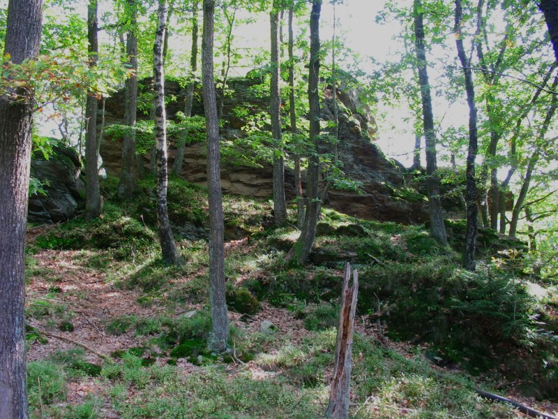 Naturschutzgebiet „Stelborner Klippen“: Die Stelborner Klippen oberhalb Stelborn in der Gemeinde Kirchhundem, NRW, Deutschland